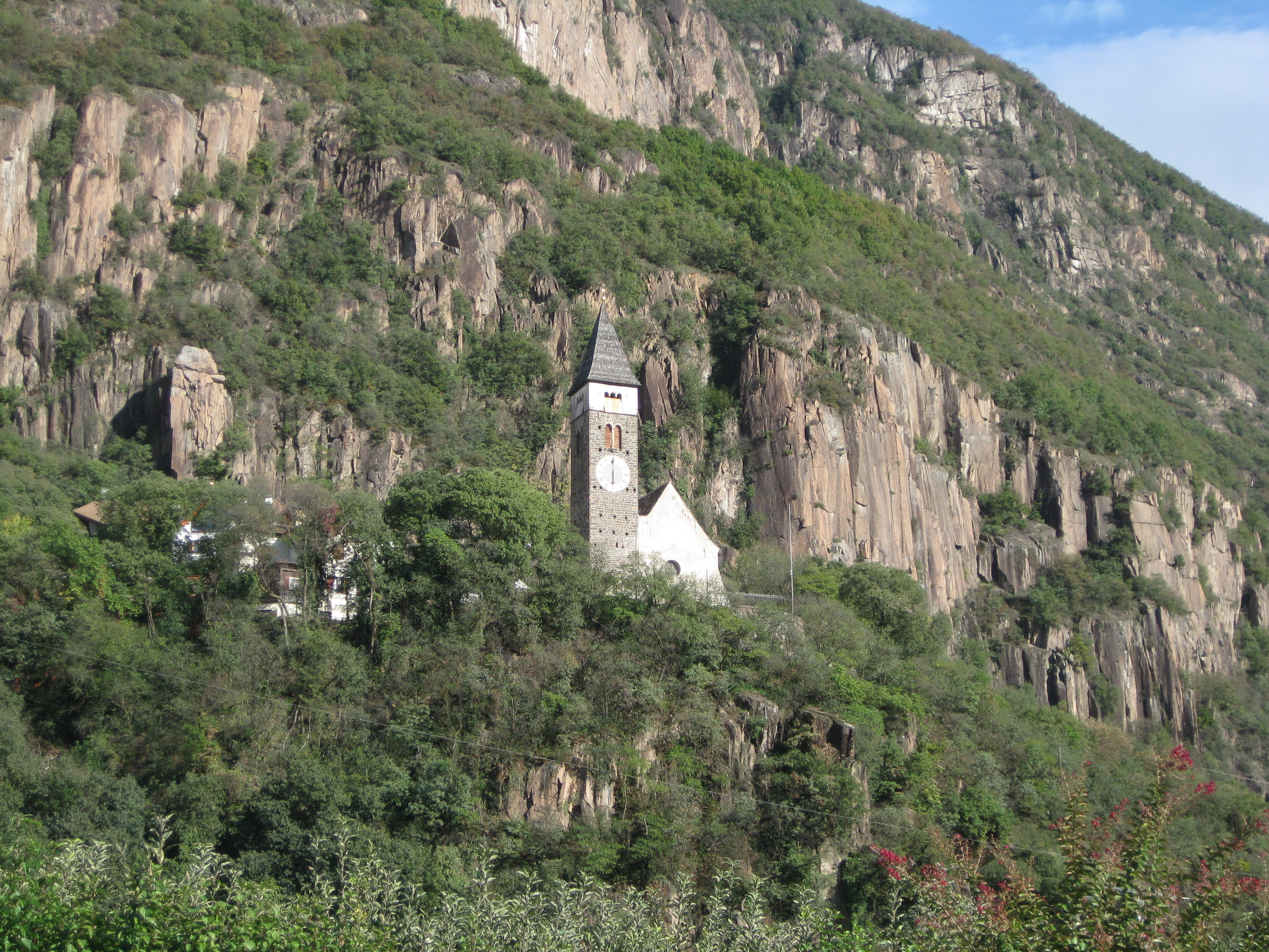 Kirche St. Jakob in der Gemeinde Leifers